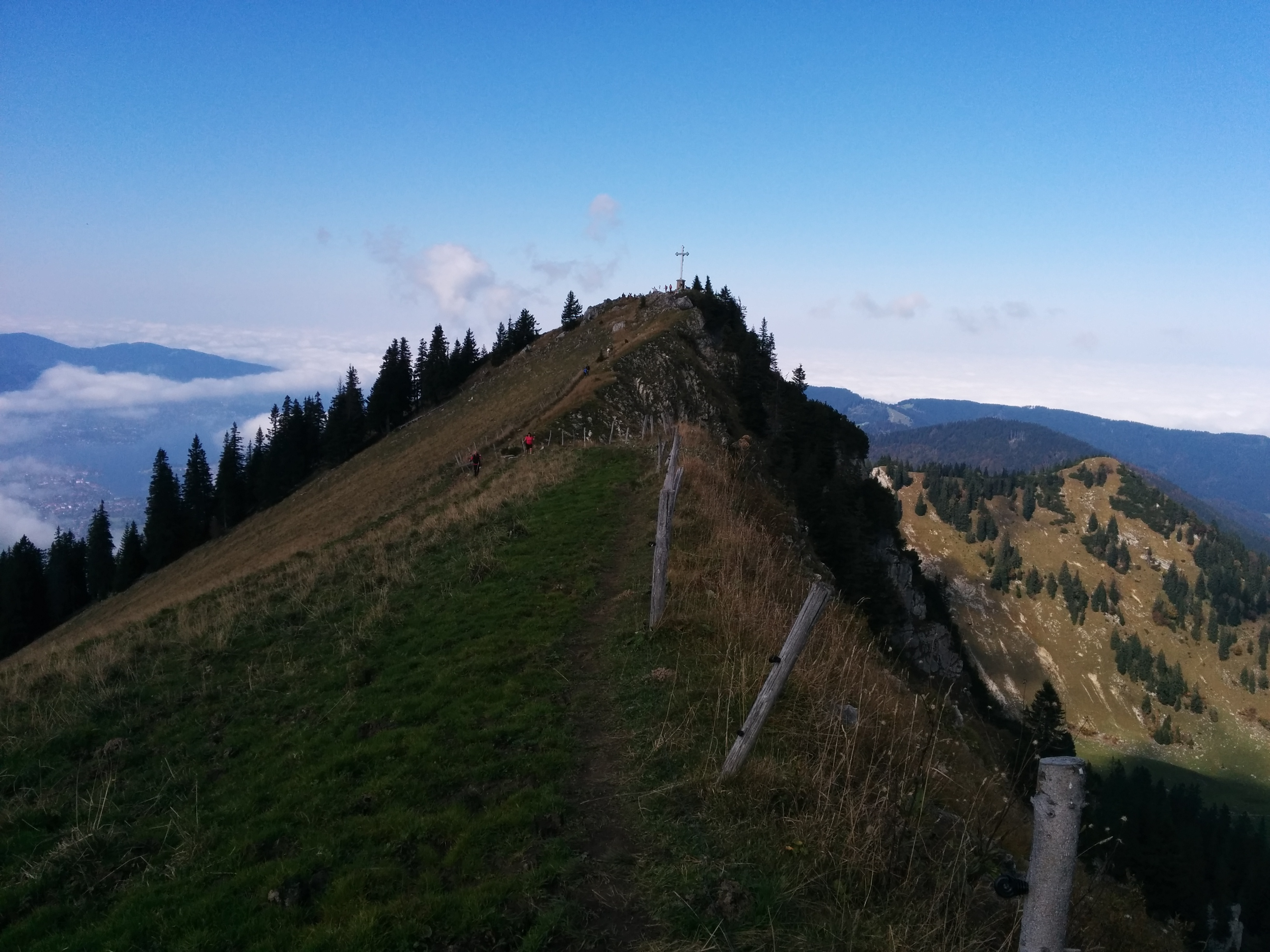 Blick auf Bodenschneid